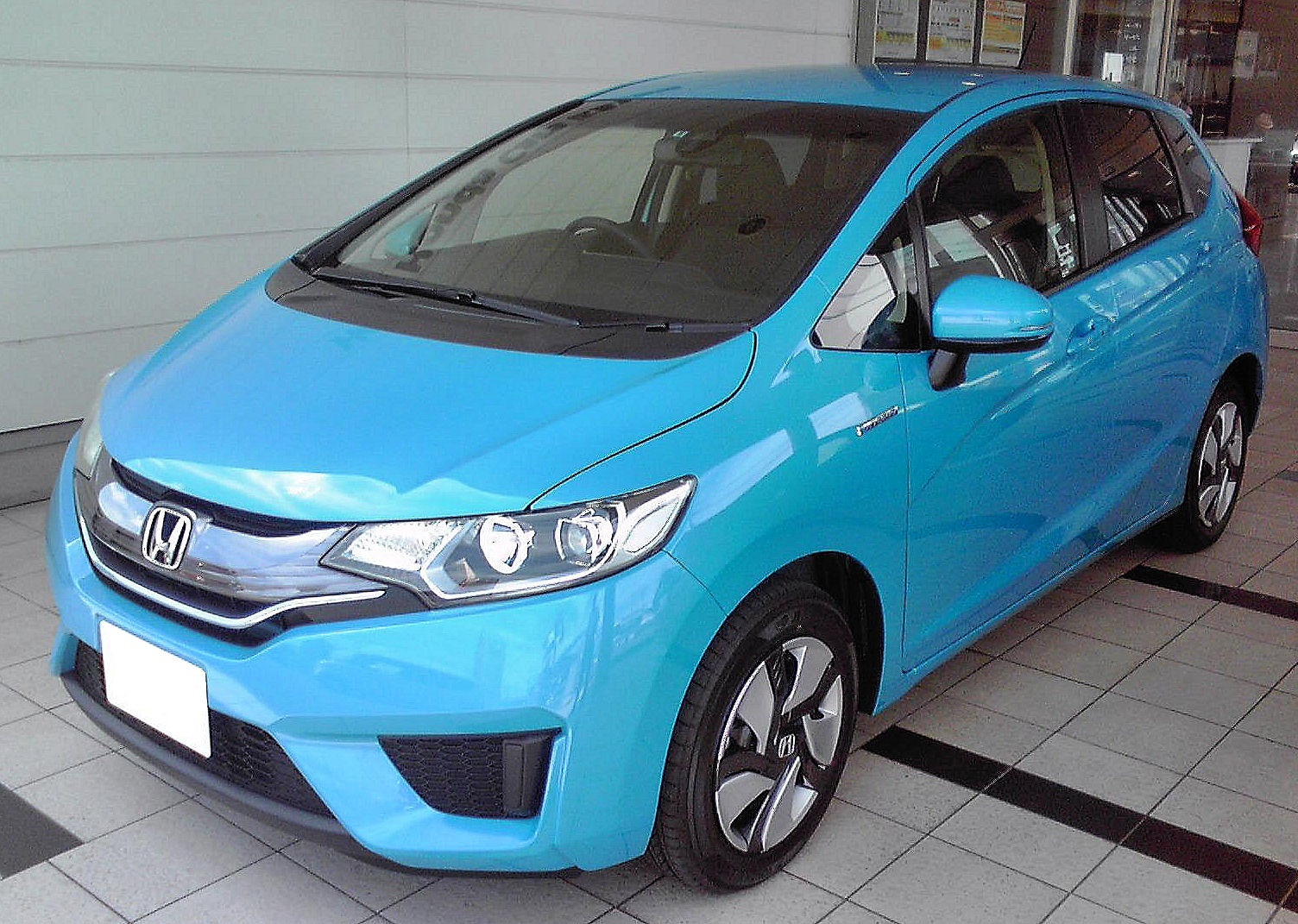 ホンダ フィット ハイブリッド HYBRID・Ｌパッケージ